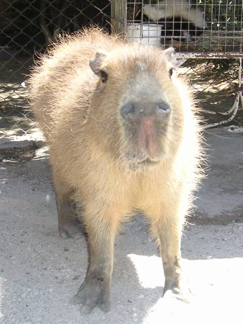 Capybara